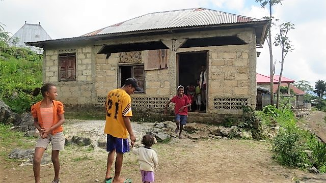 Hütte in Laclo, Atsabe, Ermera, Osttimor